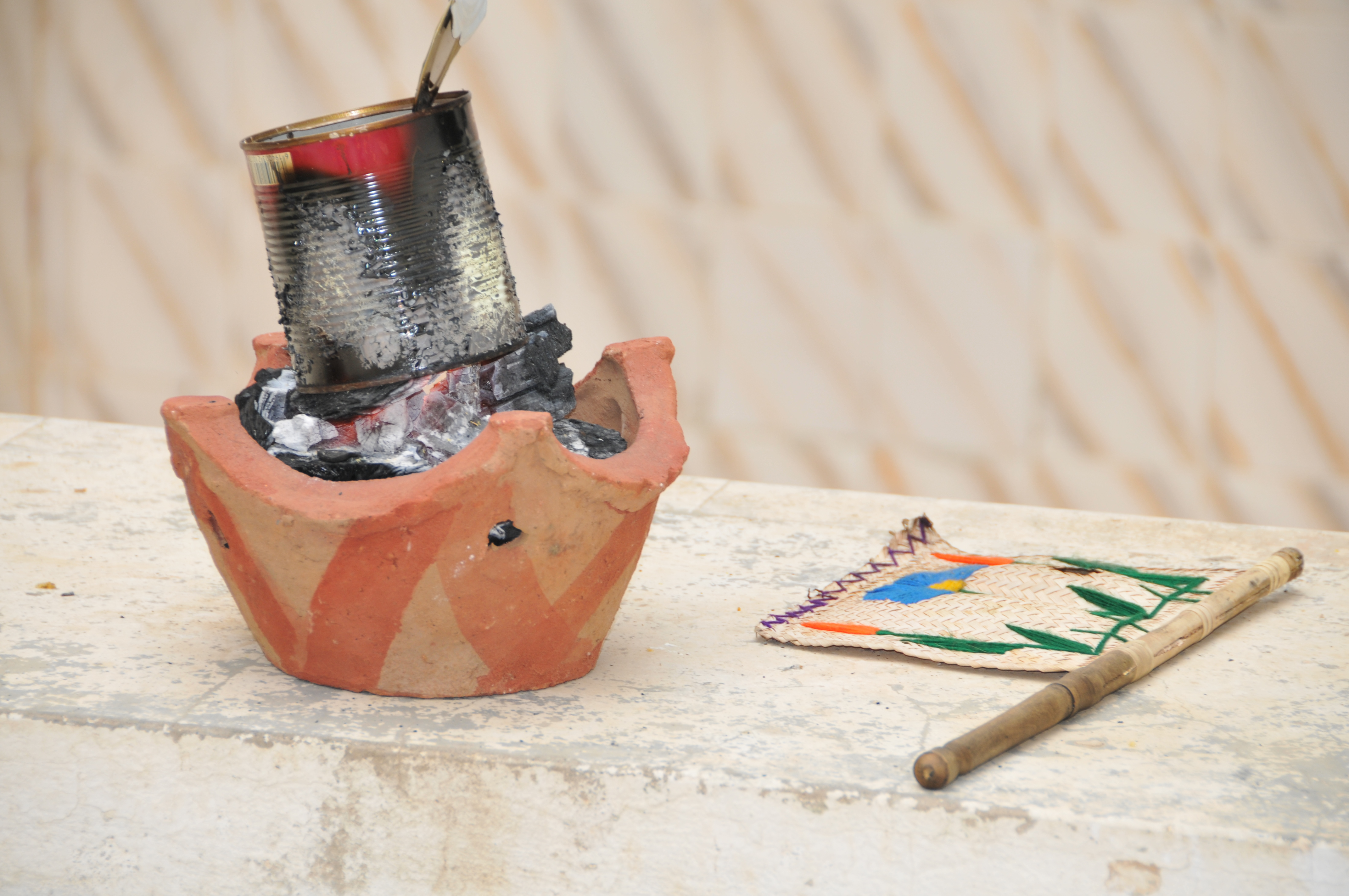 Pour réussir un bon méchoui: un kanoun (le pot en terre), une saliha (la boite dessus) et une merouaha (celle qui est à droite pour remuer).